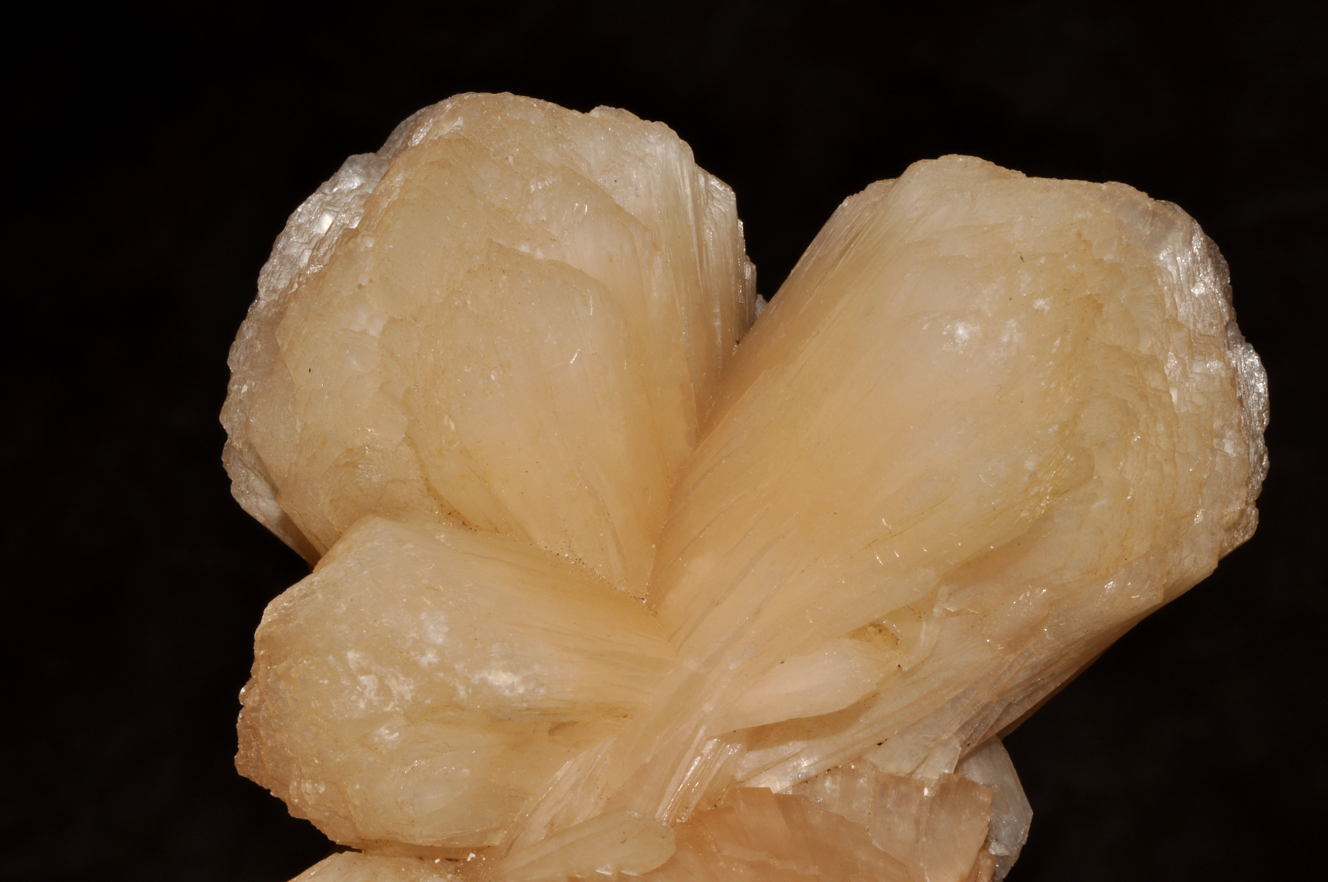 cristaux de stilbite orange